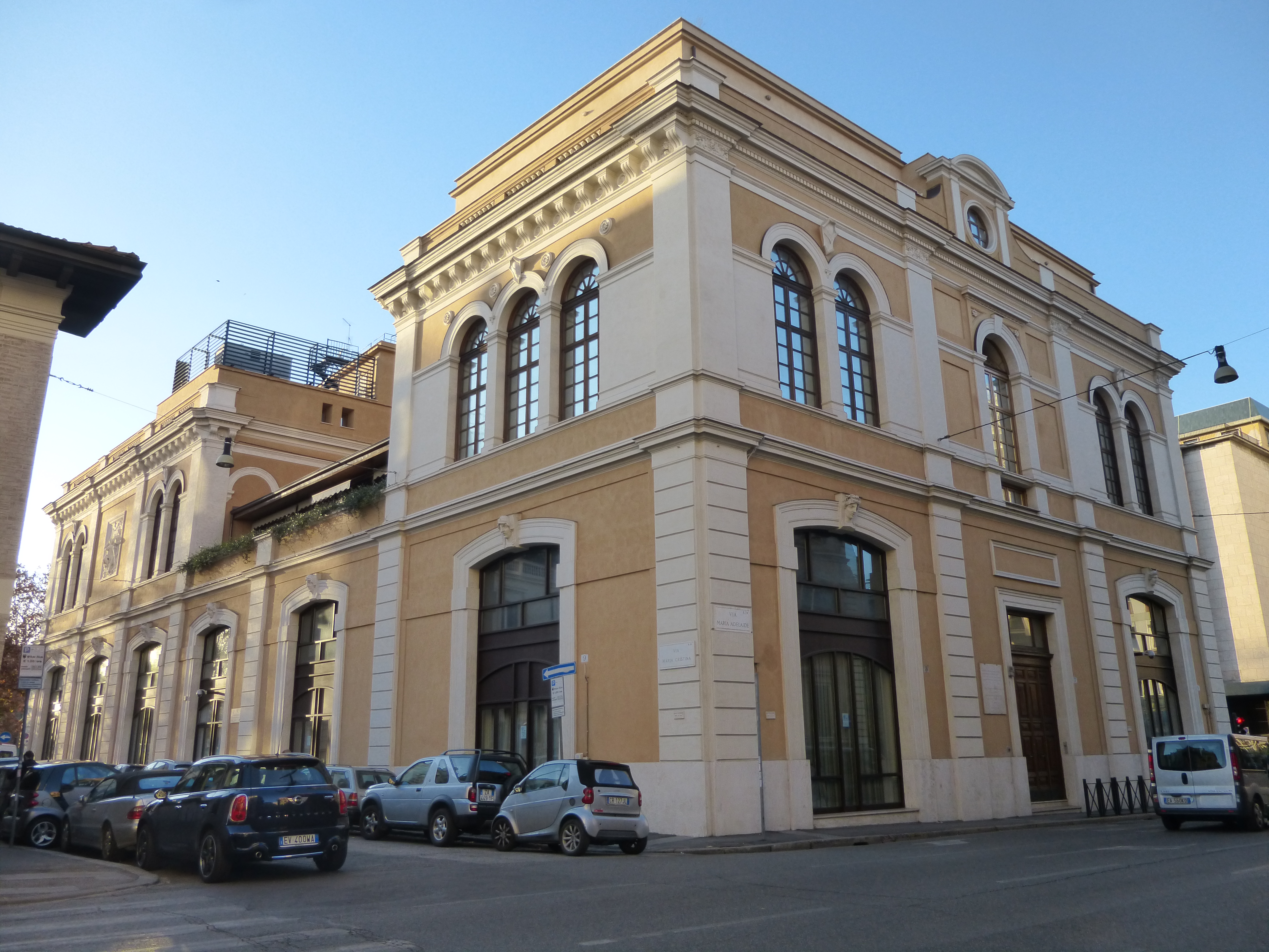 Roma, palazzo Corrodi angolo via Maria Cristina - via Maria Adelaide.